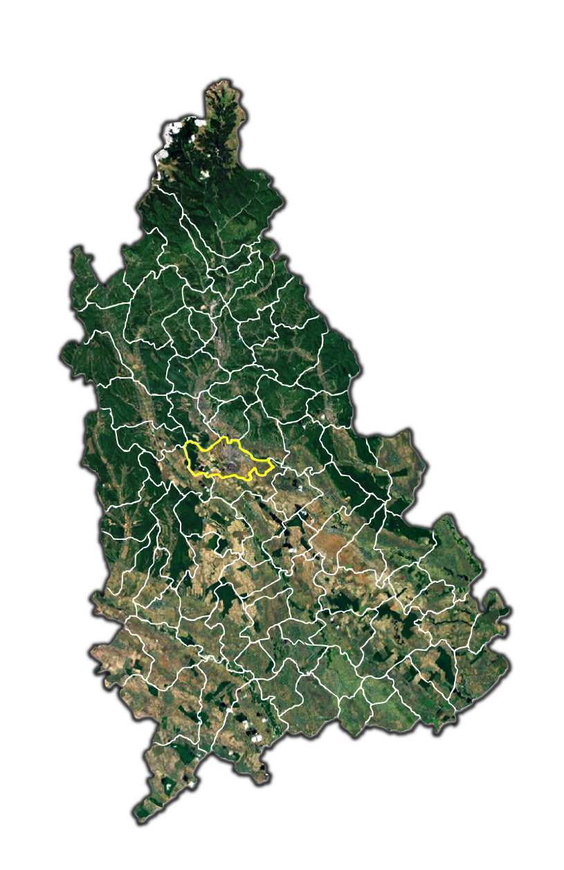 Targoviste jud Dambovita.png